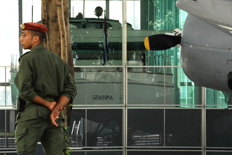 Cuba, september 2005, info in de Metadata